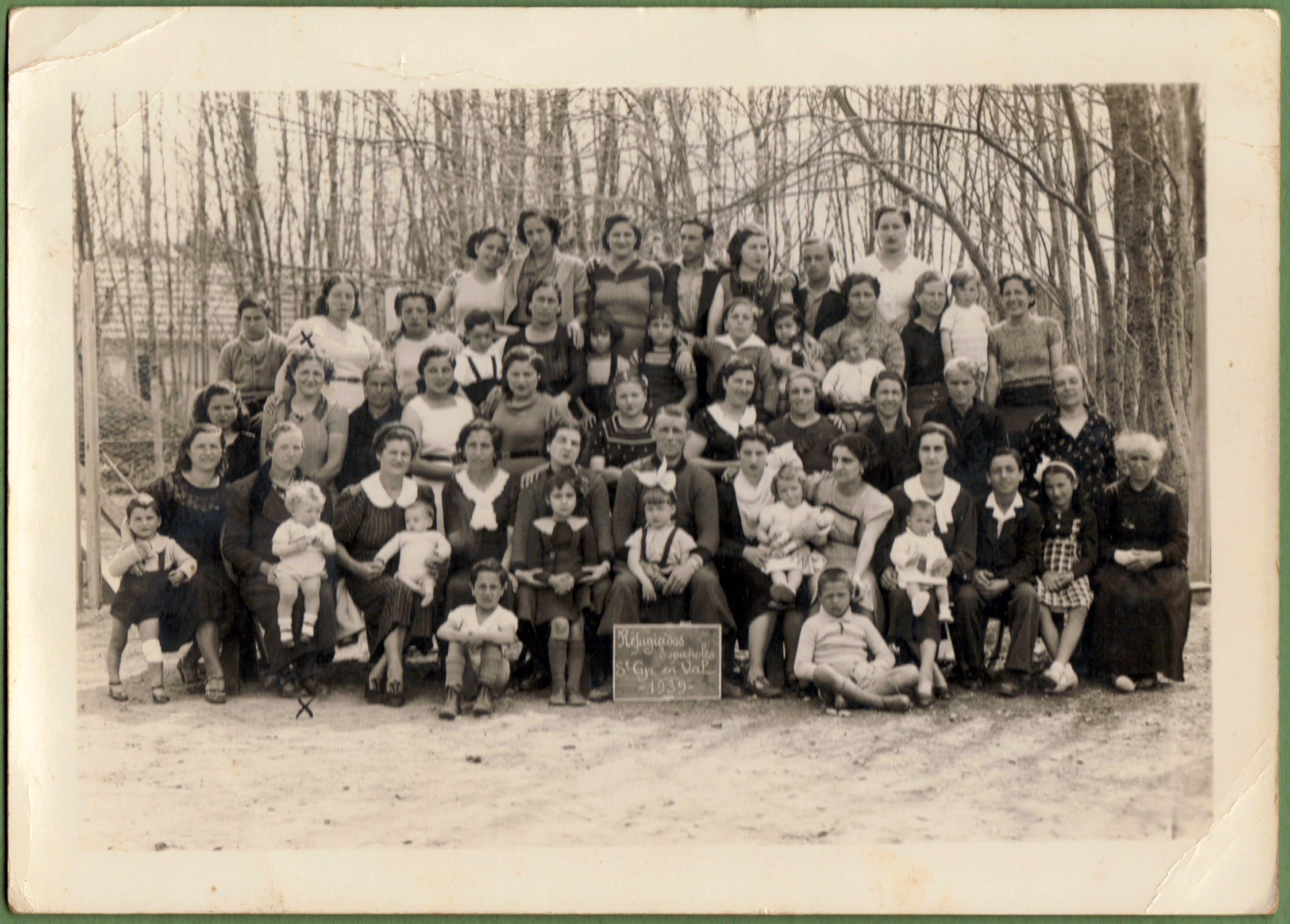 Refugiados españoles - Saint-Cyr-en-Val - 1939